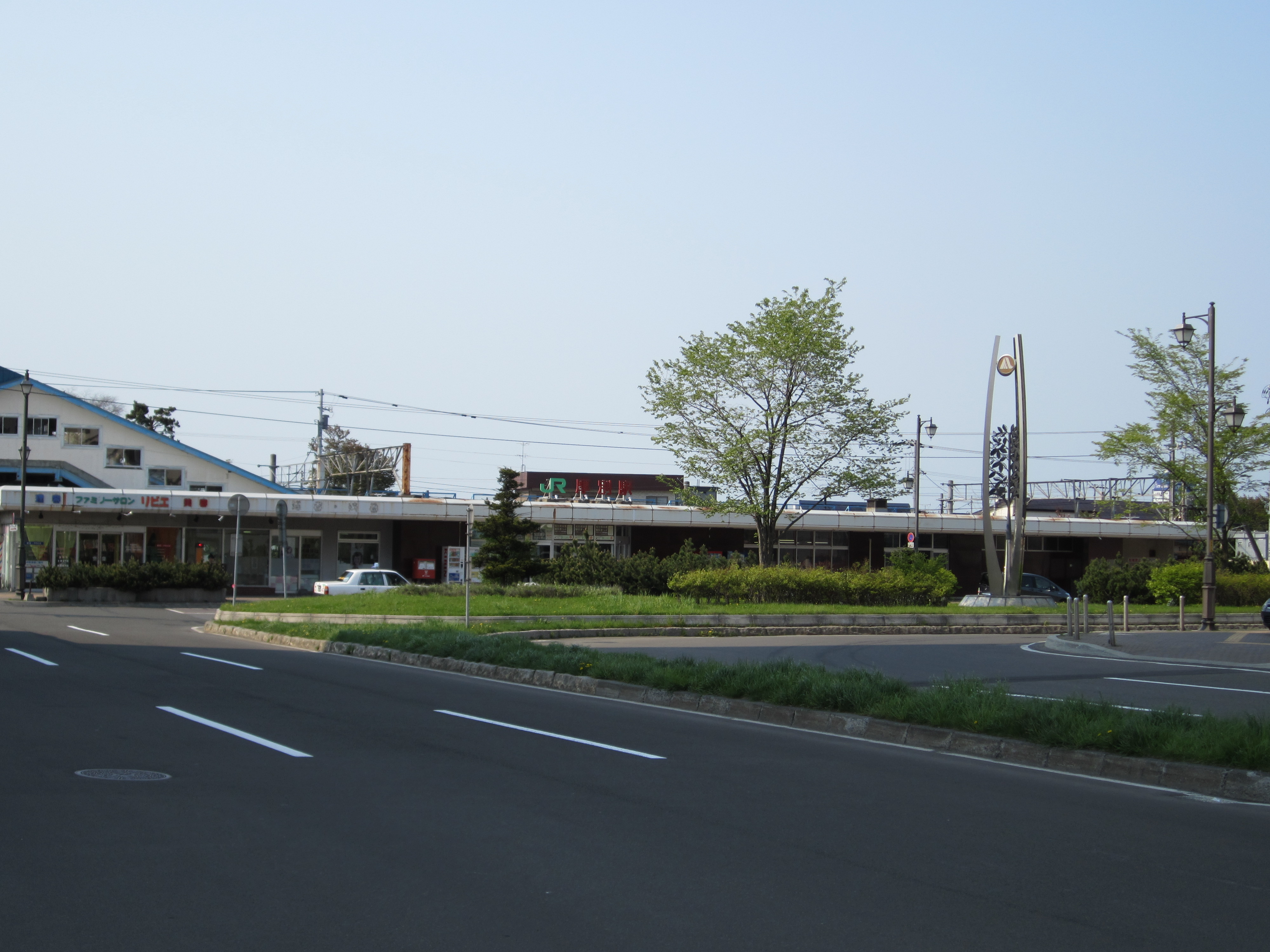 北海道旅客鉄道函館本線厚別駅